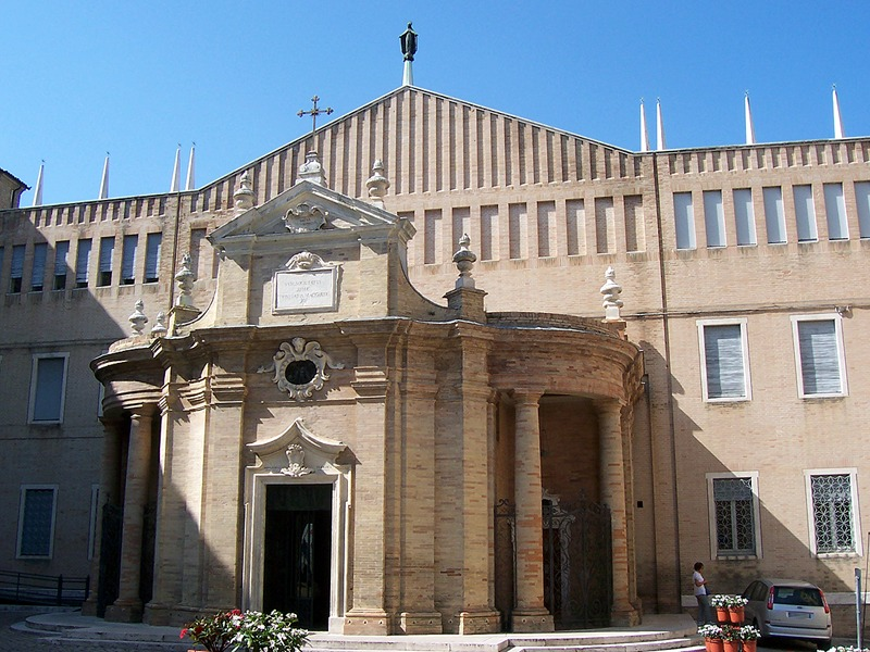 Macerata - Santuario della Madonna della Misericordia